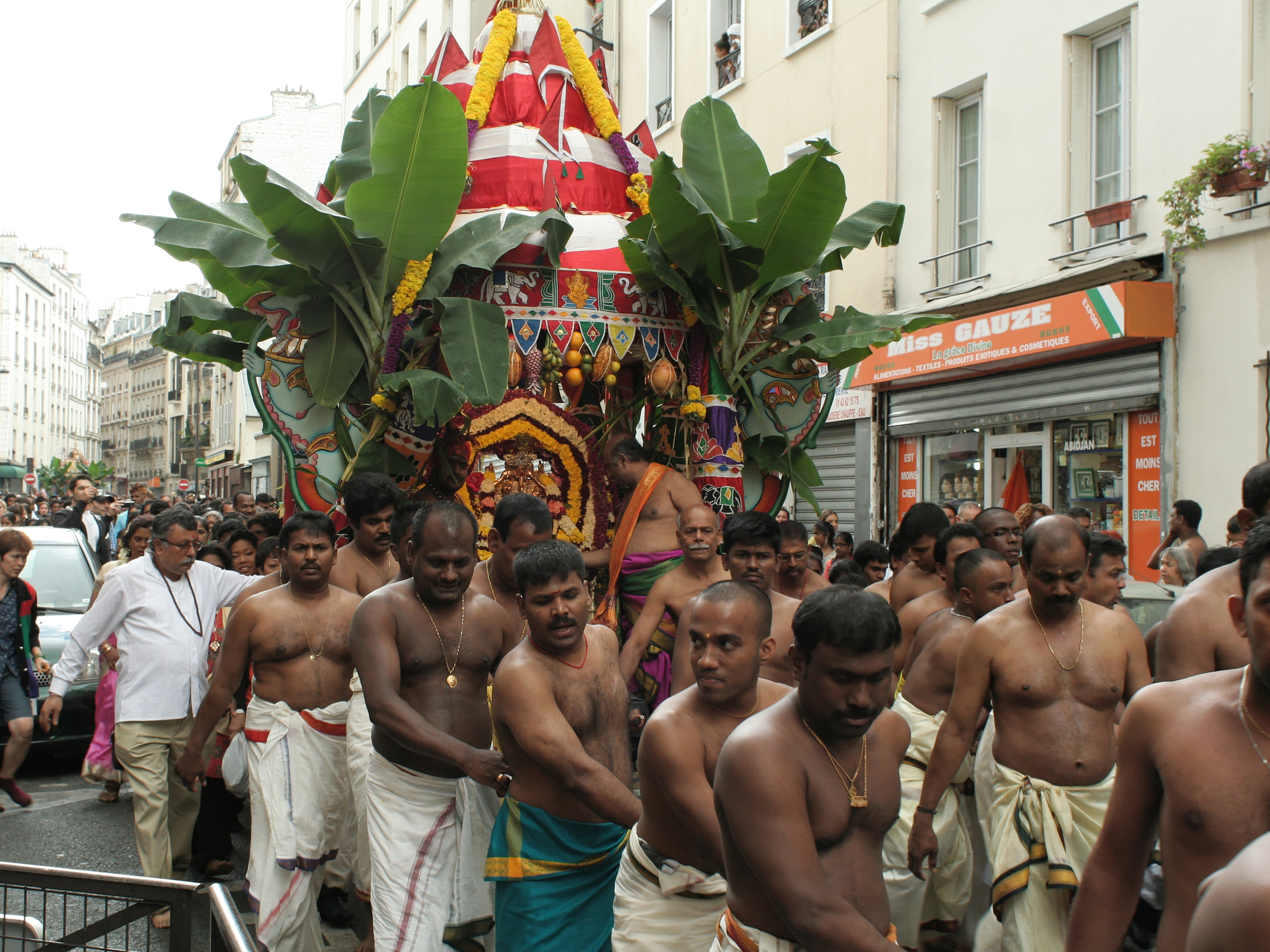 Paris, fête de Ganesh 2011. Char de Ganesh, recouvert d'étoffes rouges et blanches et décorées de nombreuses guirlandes, de fleurs fraîches, de régimes entiers de bananes, de noix de coco et de feuilles d'aréquiers, tiré par des hommes pieds nus. Rue Marcadet.